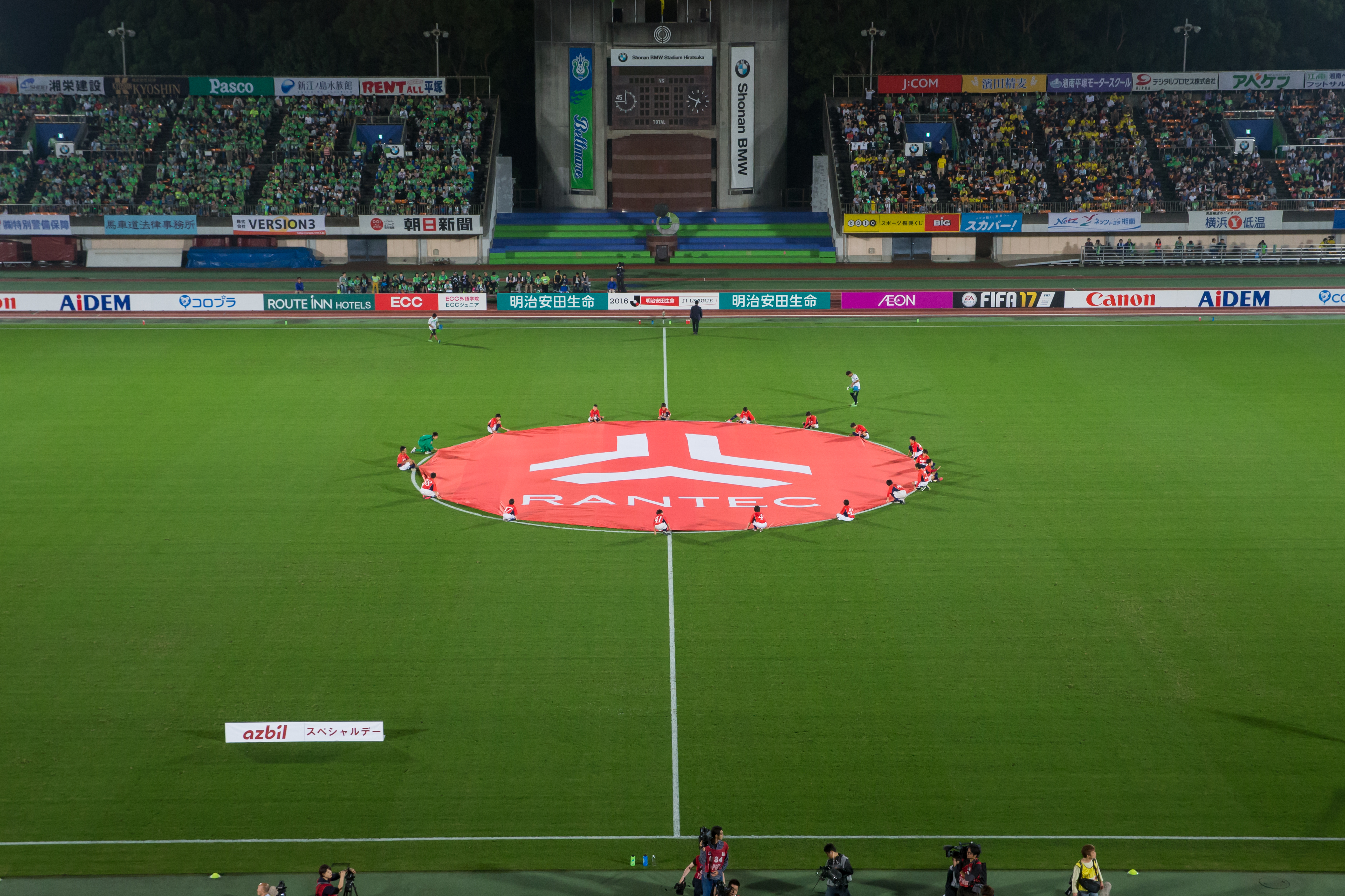 湘南ベルマーレに対し協賛を行っている